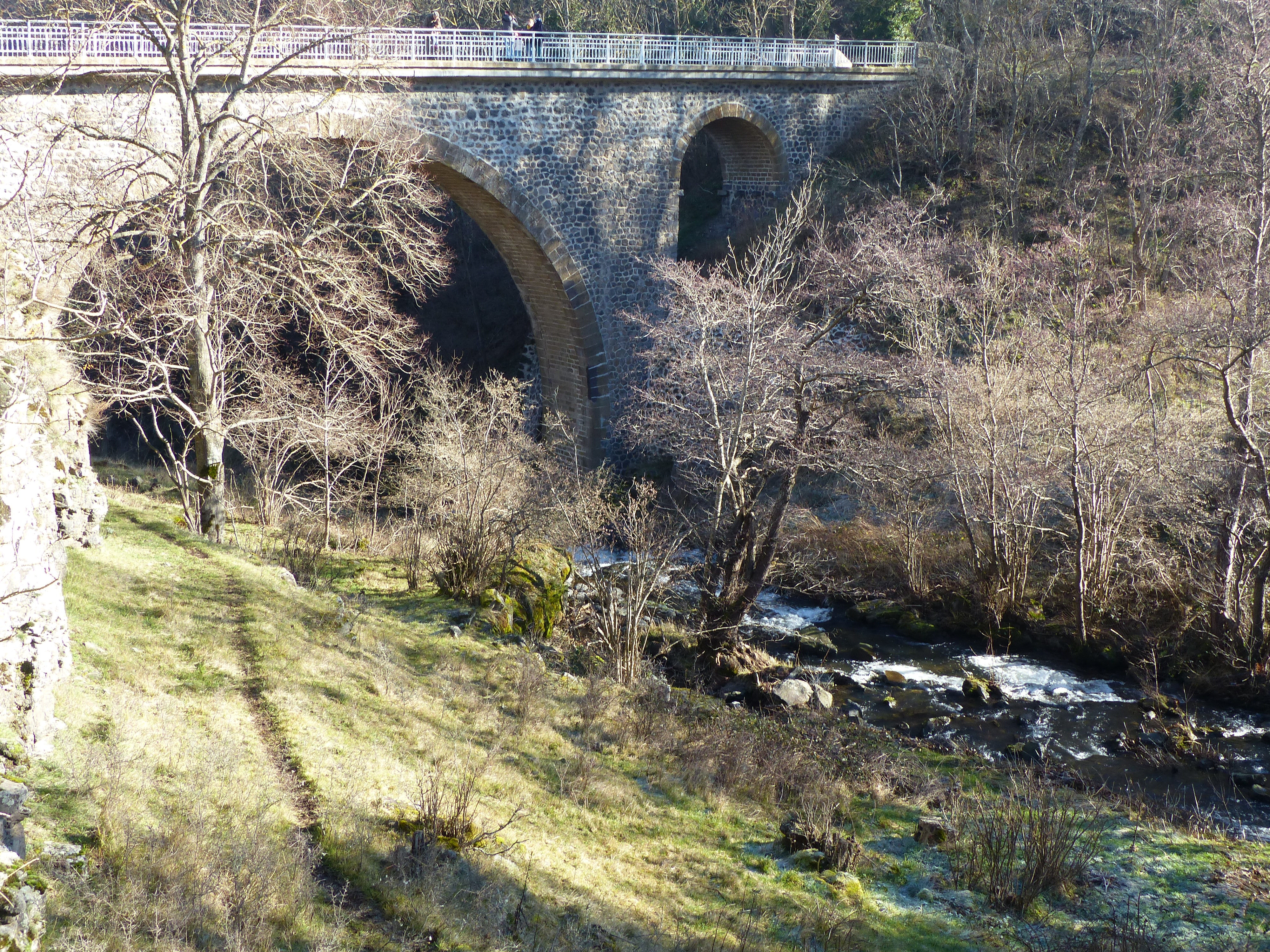 Le Dolaizon et le pont de la Roche au lieudit Les Vigneaux (commune de Vals-près-le-Puy)